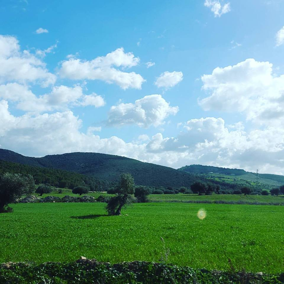 Ain Jammela Téboursouk